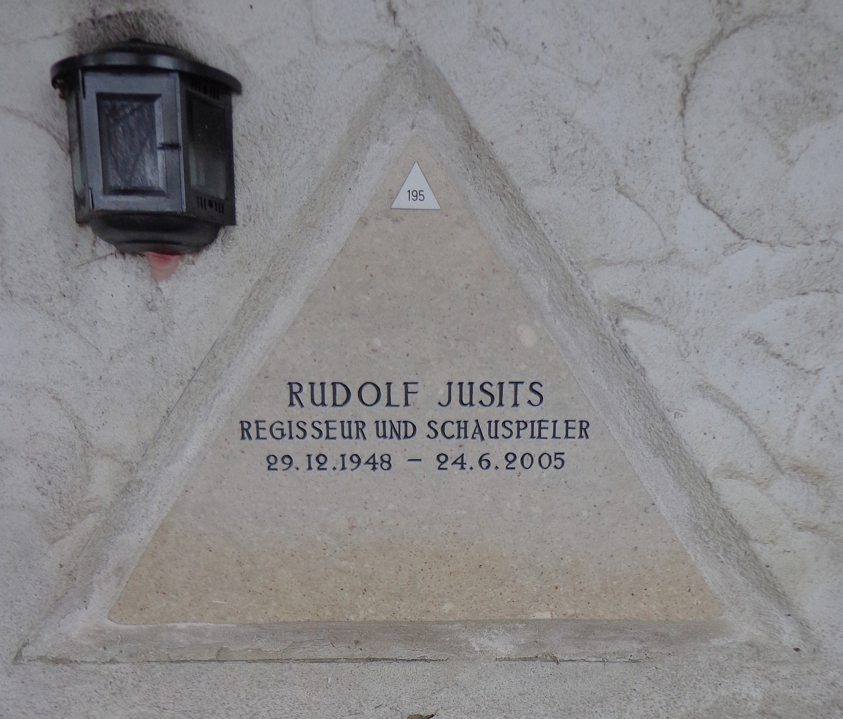 Feuerhalle Simmering - Arkadenhof (Abteilung ALI) - Urnengrab Rudolf Jusits